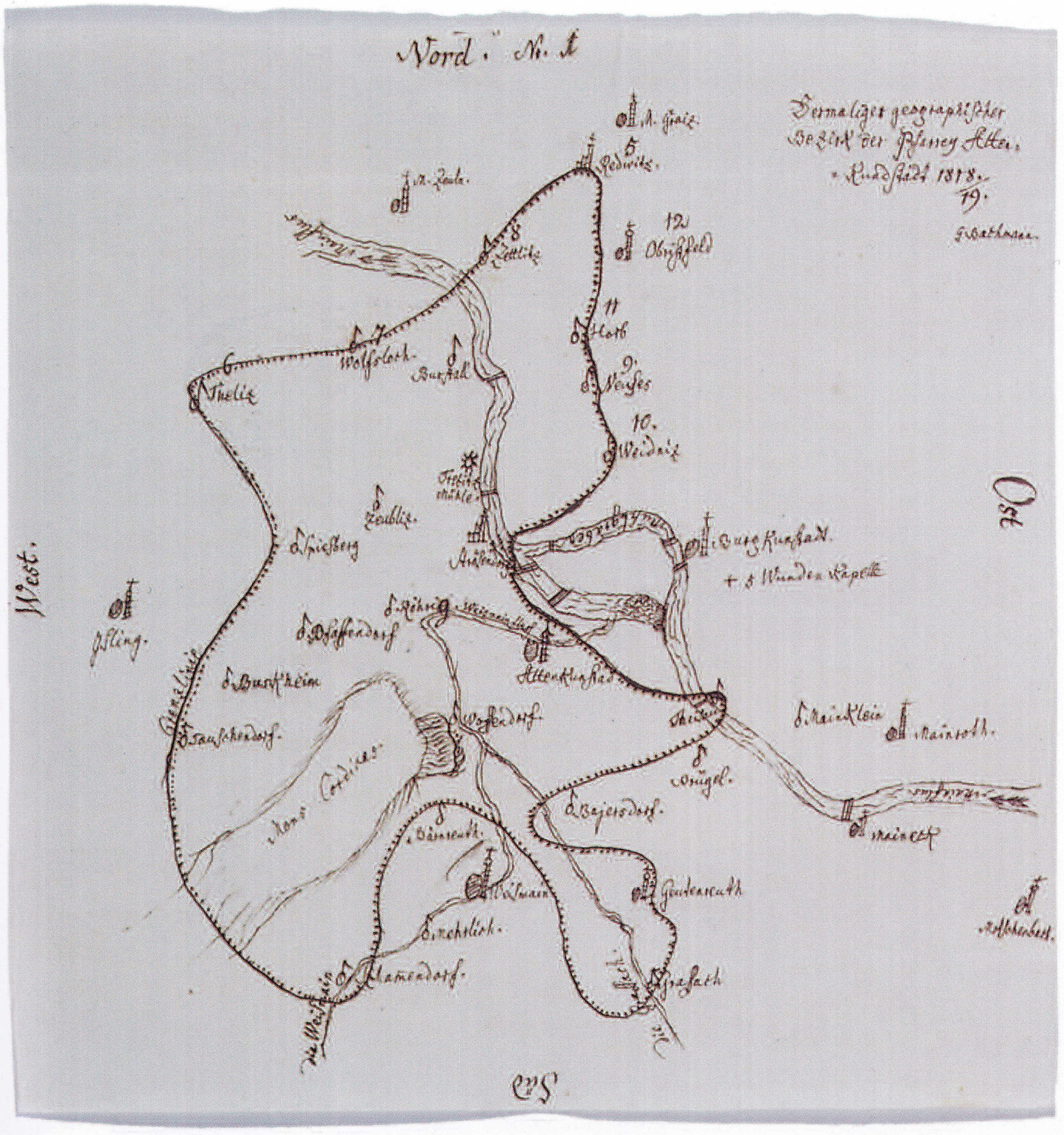 Der Pfarrsprengel der Altenkunstadter (Ur-Pfarrei) im Jahr 1818.